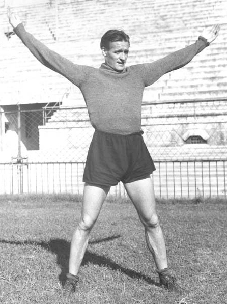 Nils Liedholm